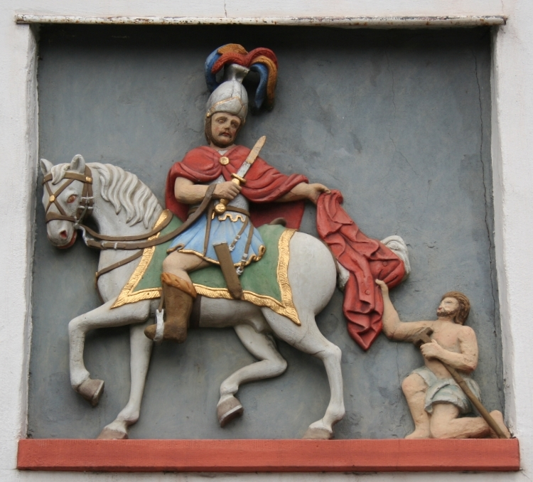 Emblème op der Fassade vum Martinsklouschter